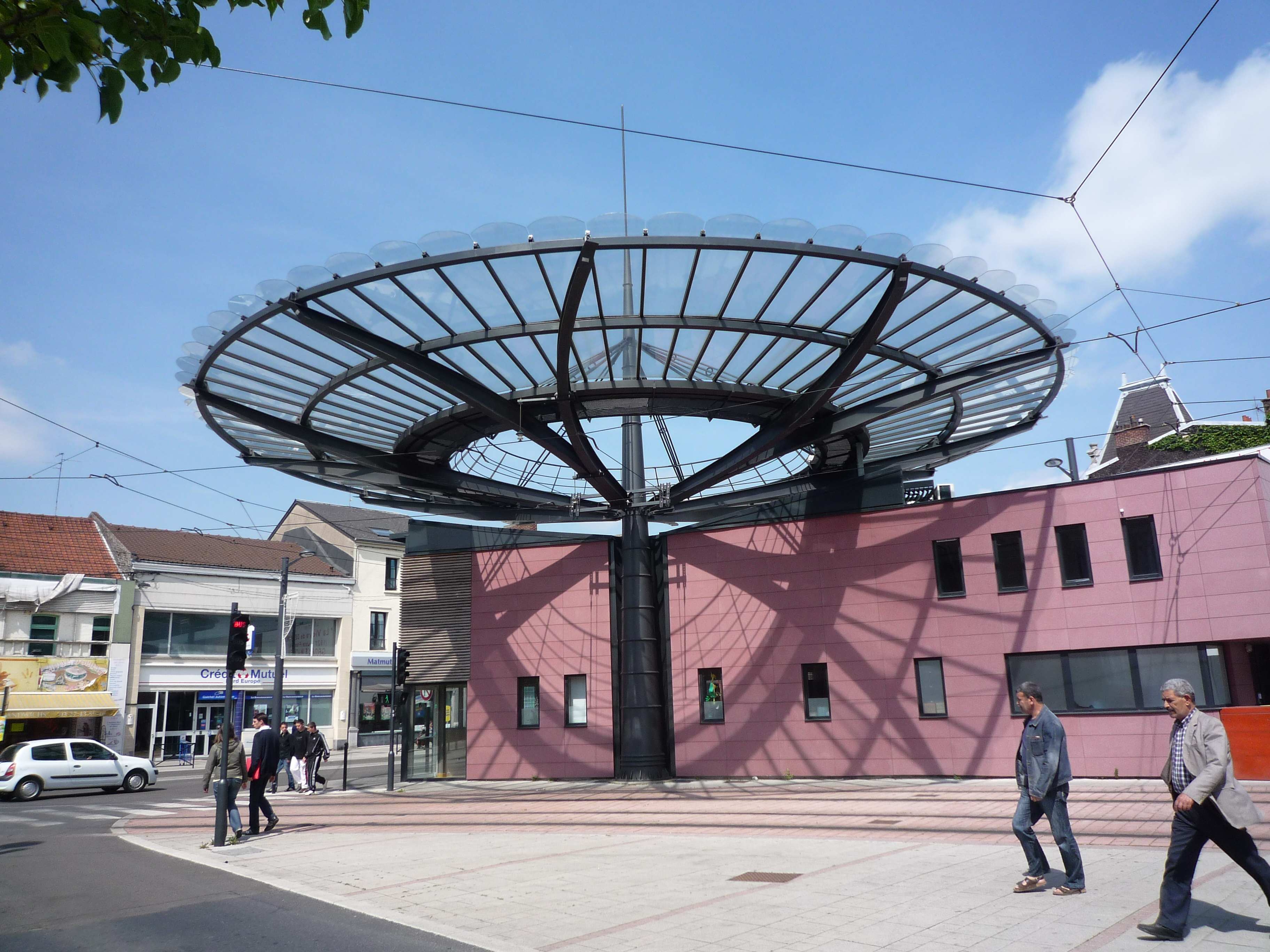 Denain, Nord, Nord-Pas-de-Calais, France.